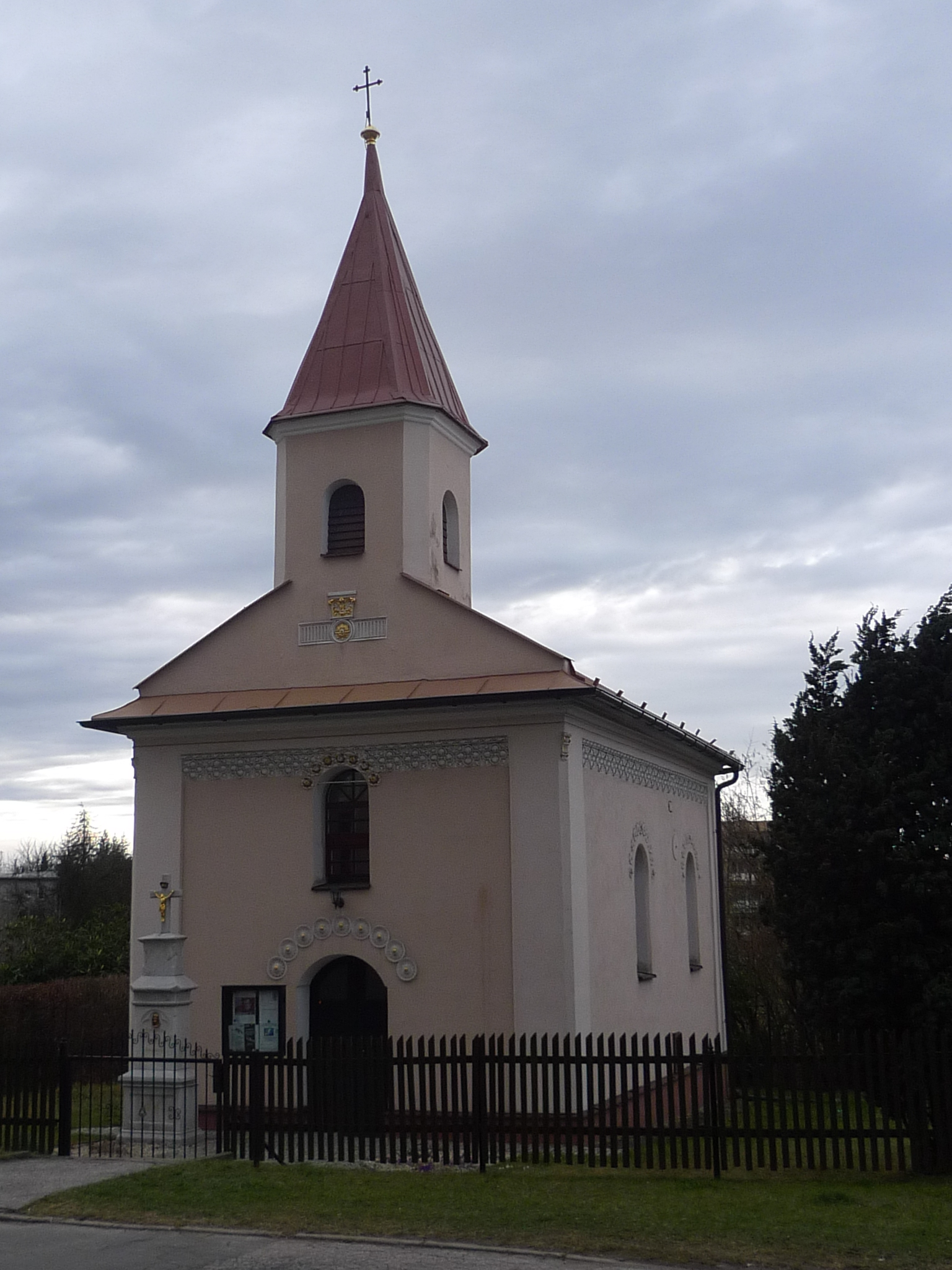 Kaplica św. Jana Nepomuckiego w Orłowej